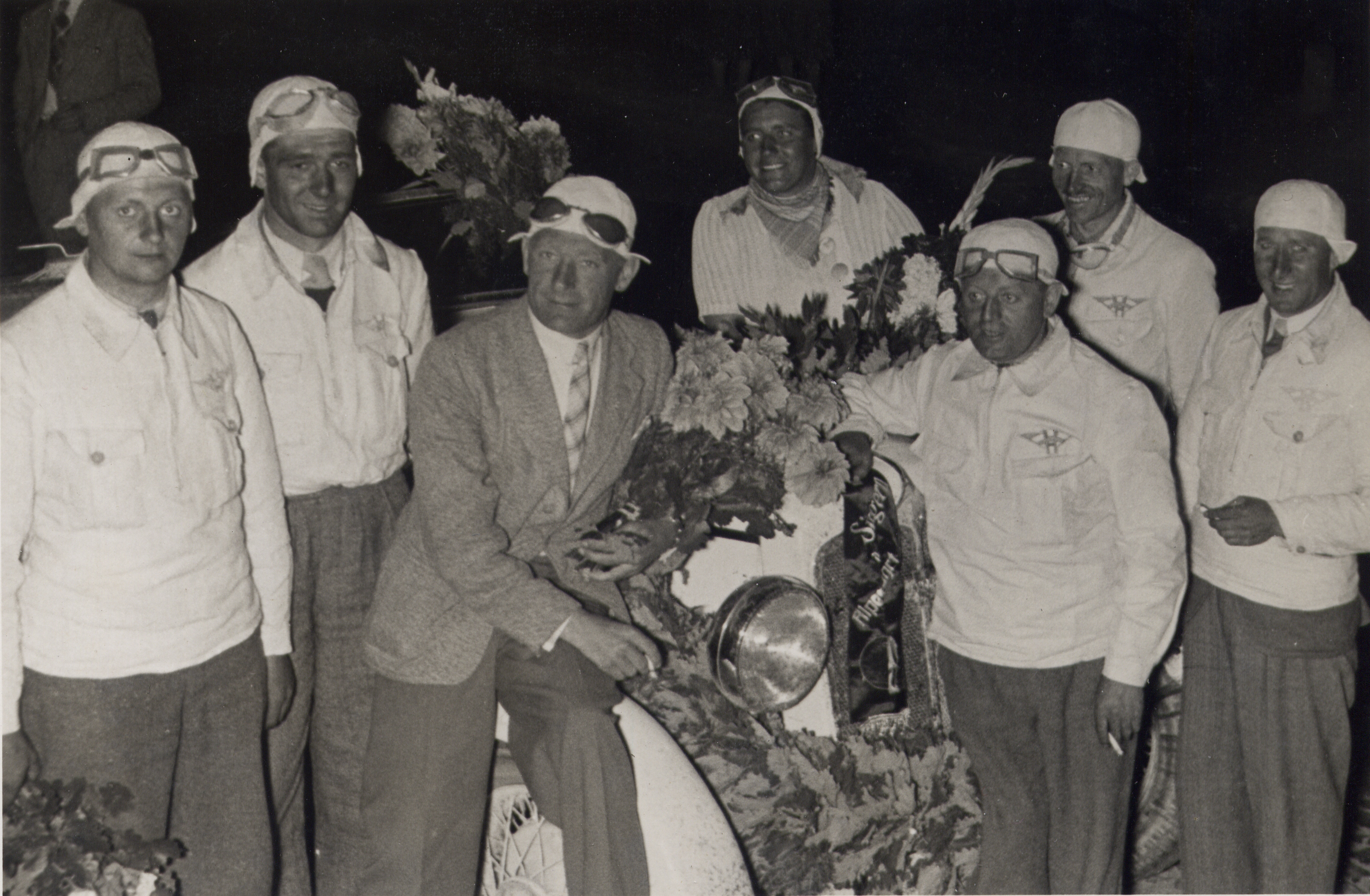 Sieger der Alpenfahrt 1938: Karl Haeberle (mit Blumen), August Lönnecker (2. von links)